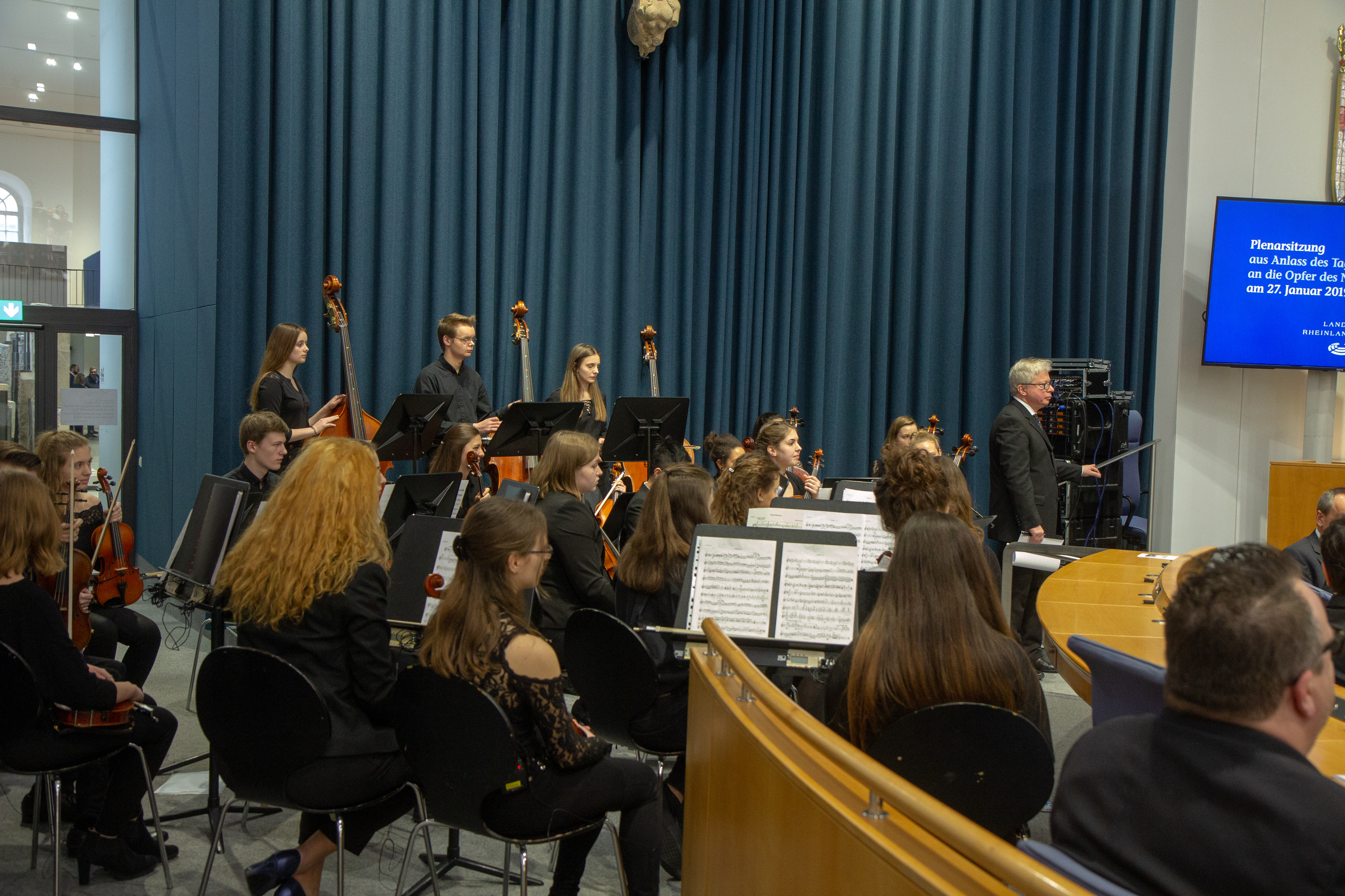 Tag des Gedenkens an die Opfer des Nationalsozialismus im Landtag Rheinland-Pfalz am 27. Januar 2019.